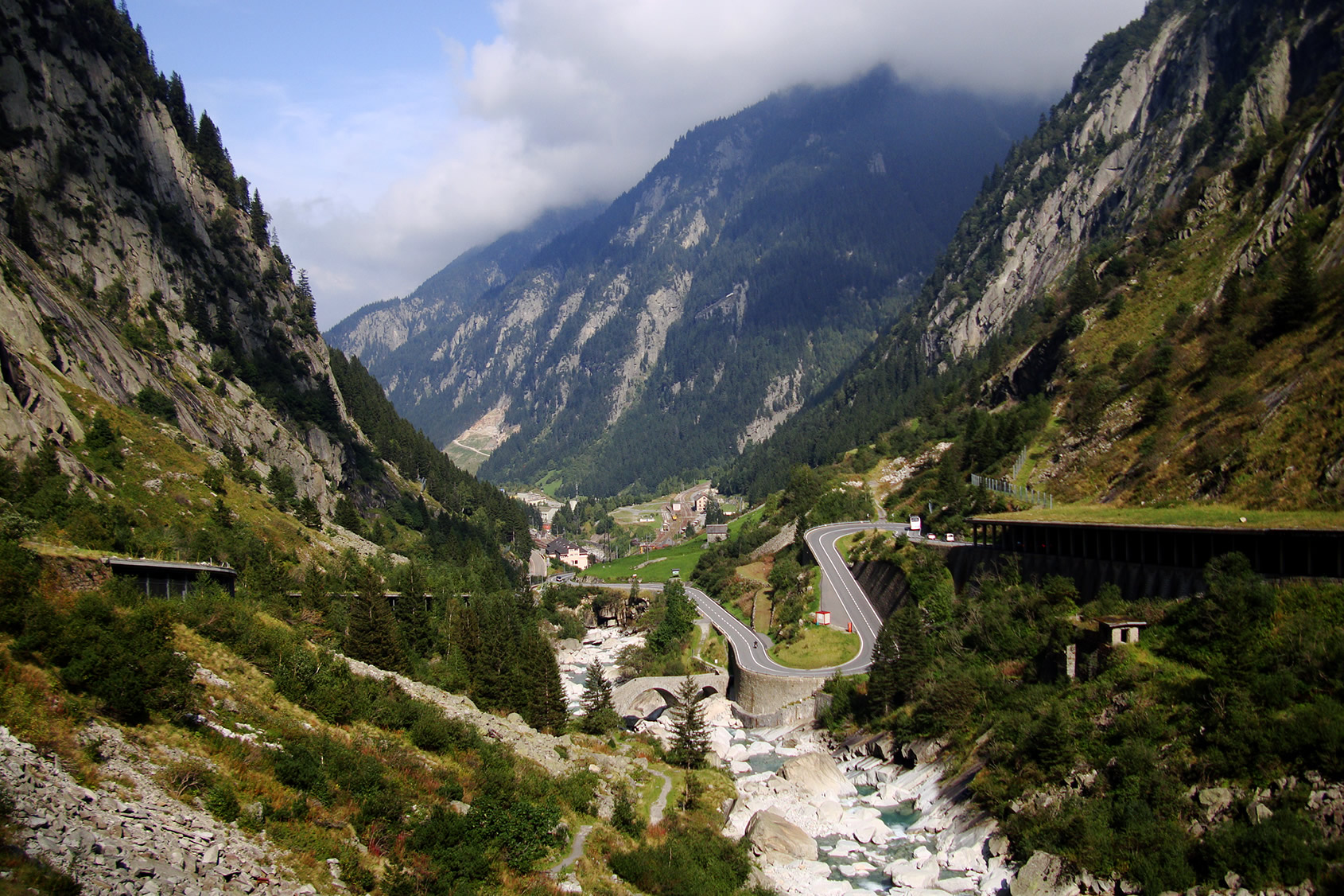 Reuss river near Göschenen